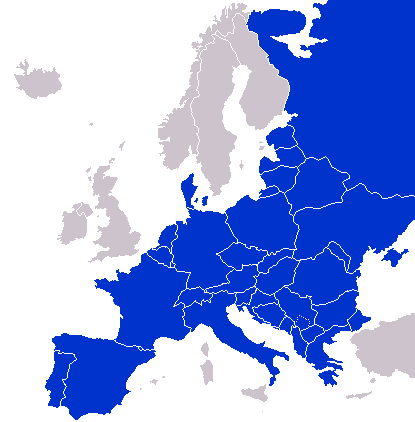 Kontinentet